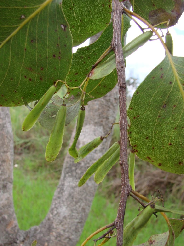 Plenckia populnea - CELASTRACEAE Parque Olhos D' Água - Brasília - Distrito Federal - Brasil.